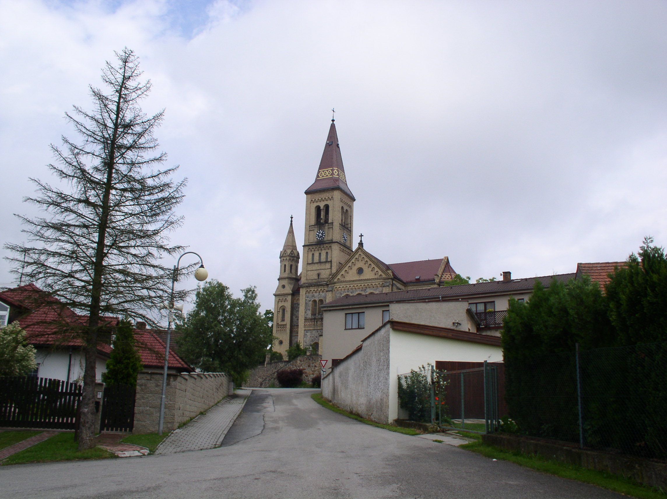 Kostel sv. Petra a Pavla (Hosín), Hosín